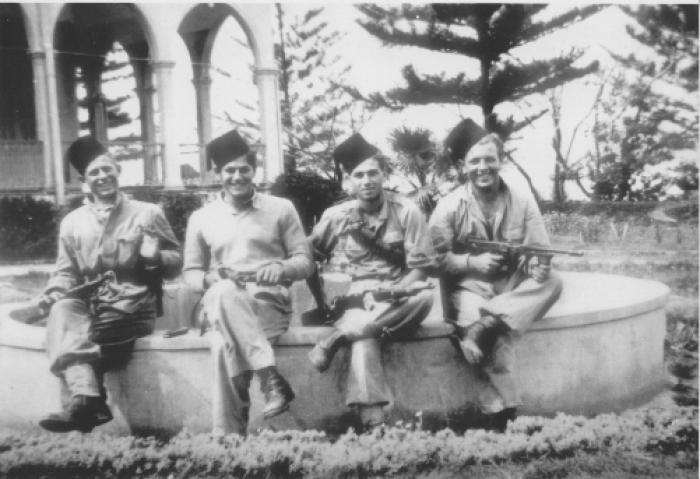 חיילים מגדוד 52 של גבעתי, אחרי כיבוש בית הבק בנס ציונה